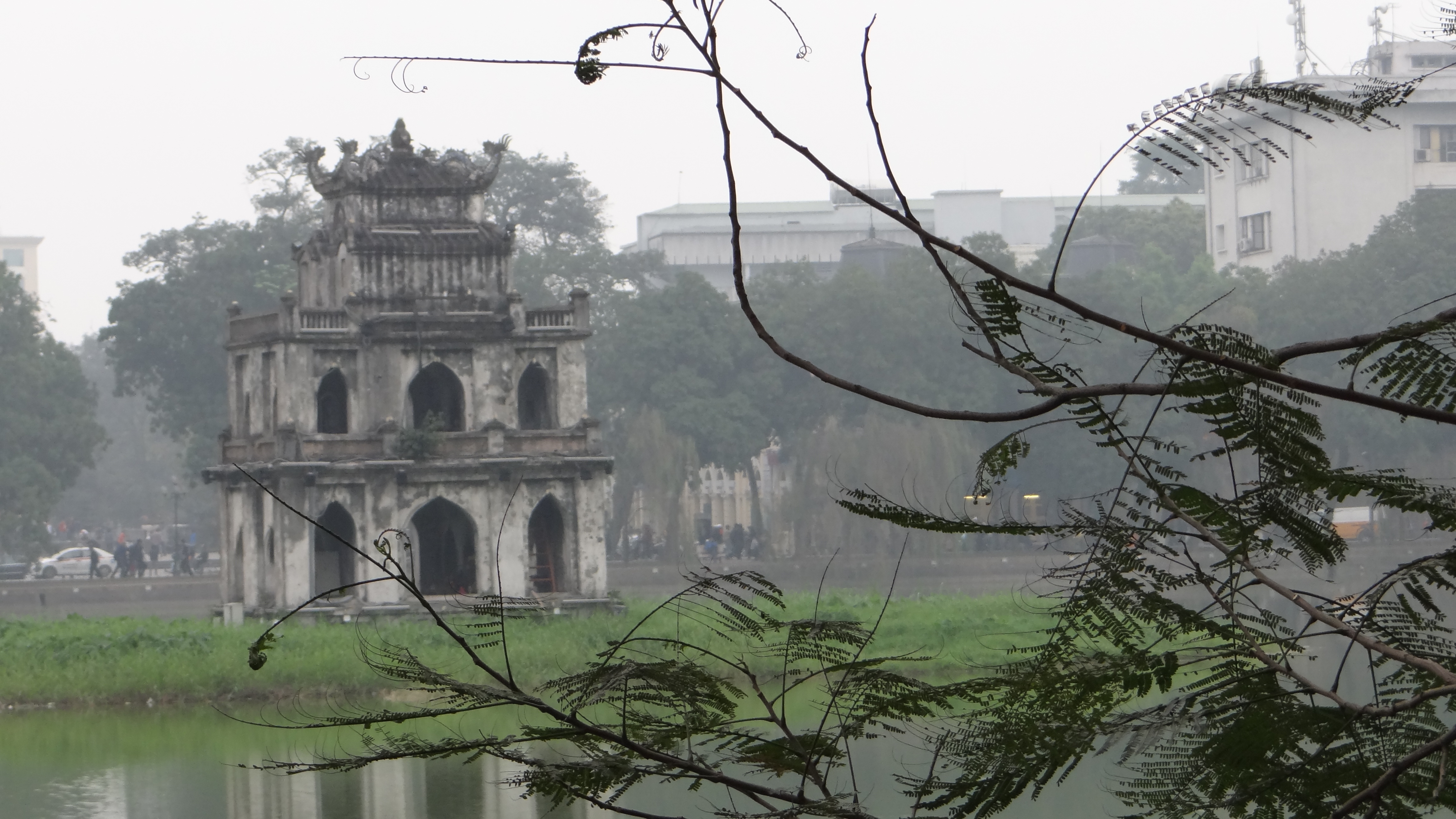 Vietnam - Ha Noï - lac Hô Hoàn Kiêm - la légende de l'épée